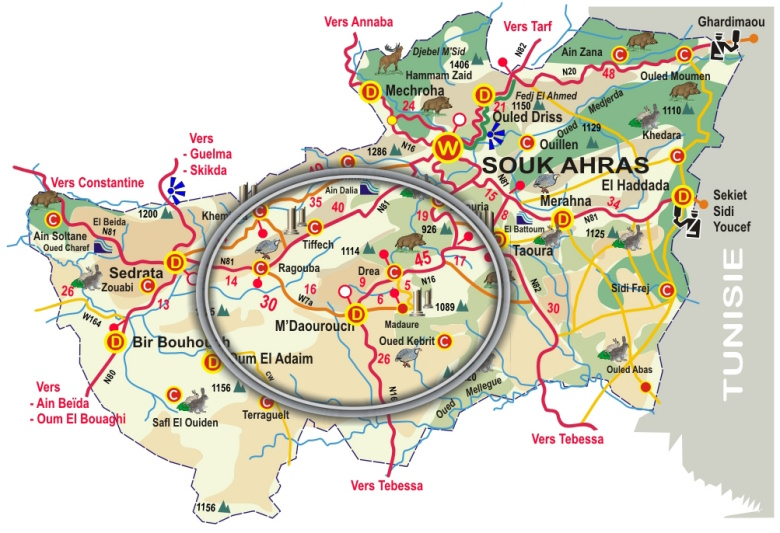 carte wilaya souk ahras